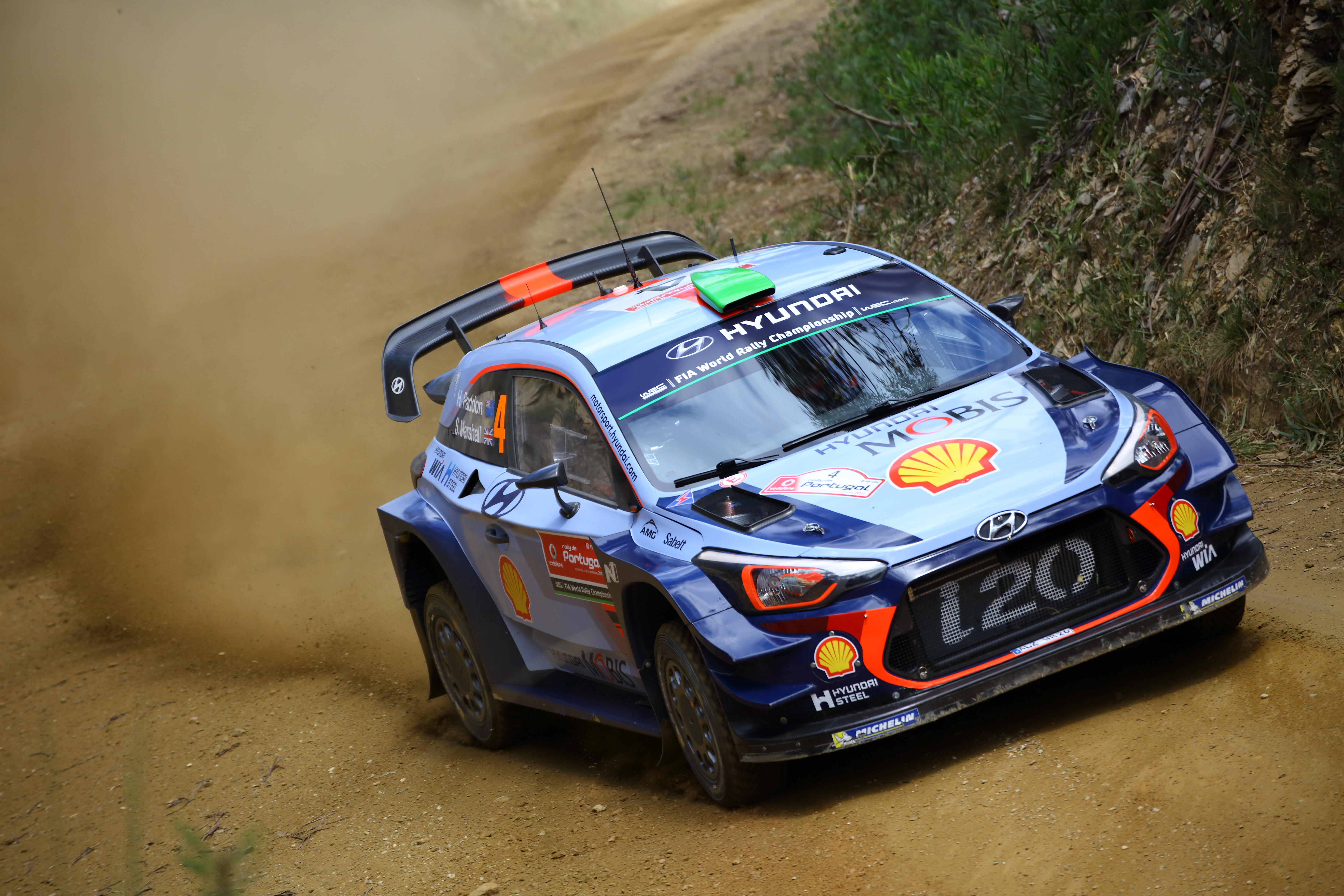 2017 Rally Portugal